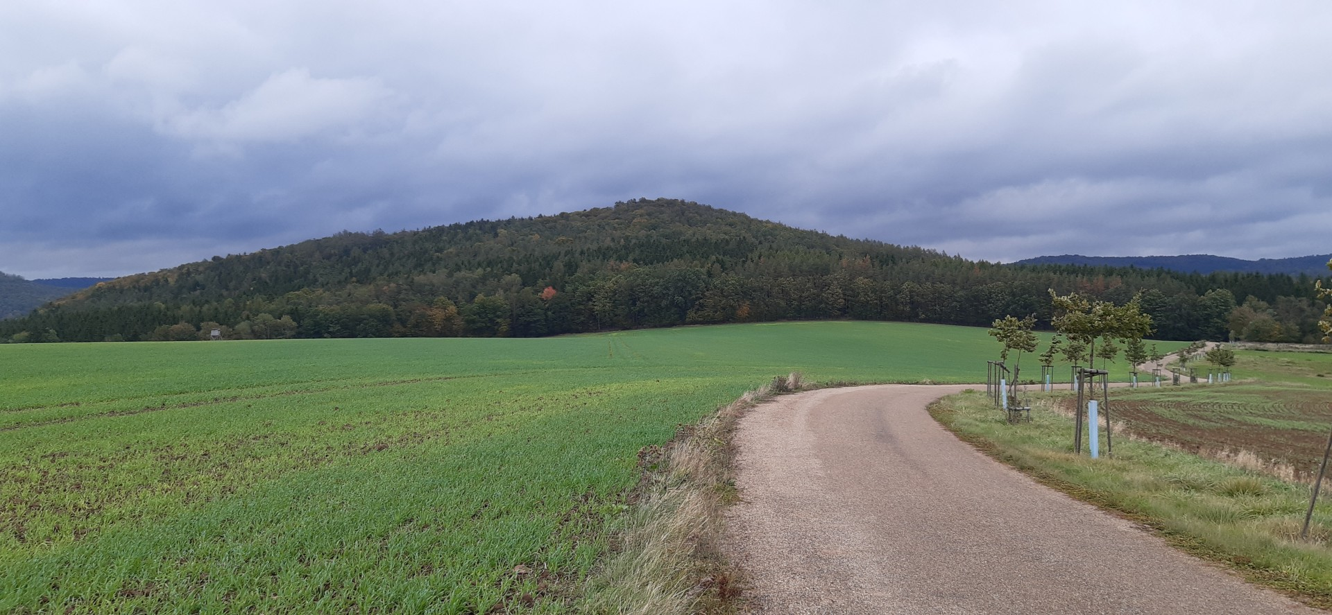 Pohled na vrch Lípa od Podmokel